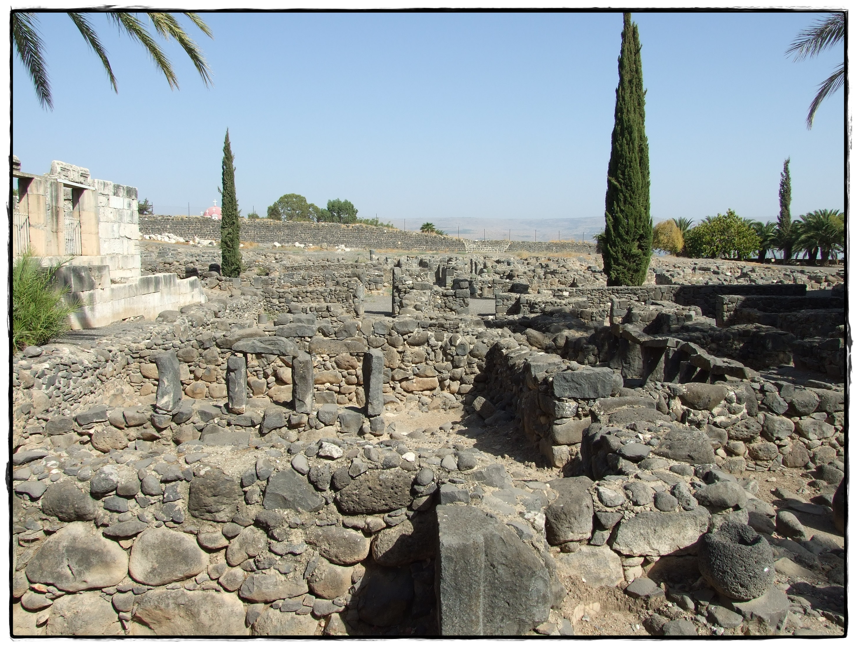 העיר העתיקה בירושלים (בערבית: بلدة القدس القديمة, נהגה: בִּלִדַת אֶלקוּדְס אֶלקָדִימָה) היא האזור העירוני העתיק של ירושלים. שטחה המוקף על ידי חומות ירושלים הוא כ-850 דונם.כמו כן נכללים בעיר העתיקה הר ציון ועיר דוד, הנמצאים מחוץ לחומות, בסמוך ומצד דרום. העיר העתיקה מהווה מוקד משיכה מרכזי לתיירים בני דתות ואומות שונות, אשר באים מרחבי העולם לבקר את האתרים הקדושים הנמצאים בה, ובהם: הר הבית, הכותל המערבי וכנסיית הקבר.